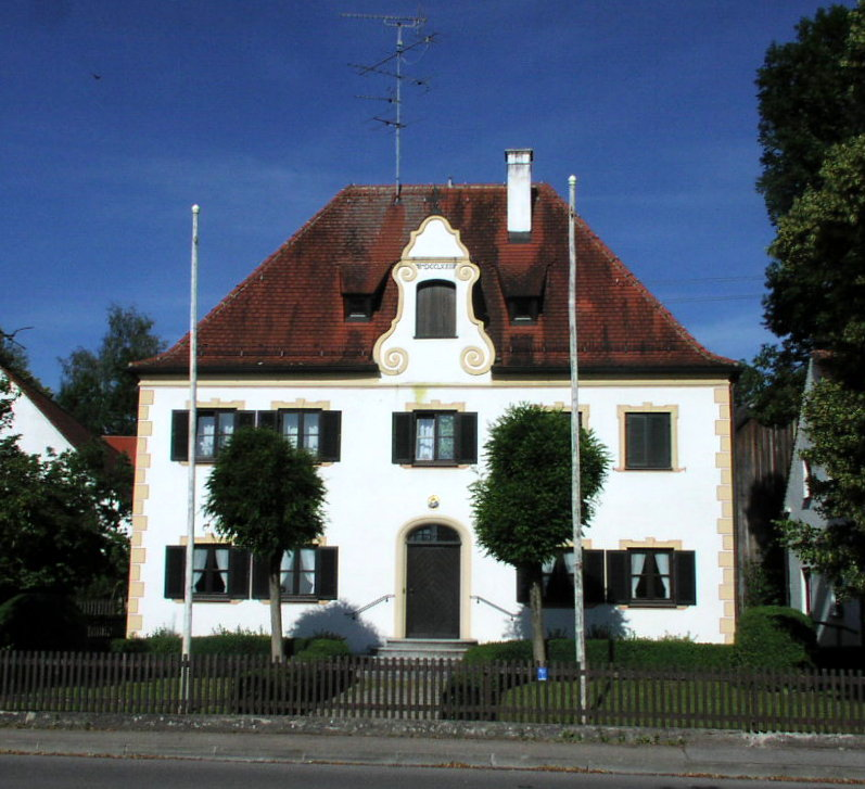 Priest's House St. Remigius in Augsburg-Bergheim